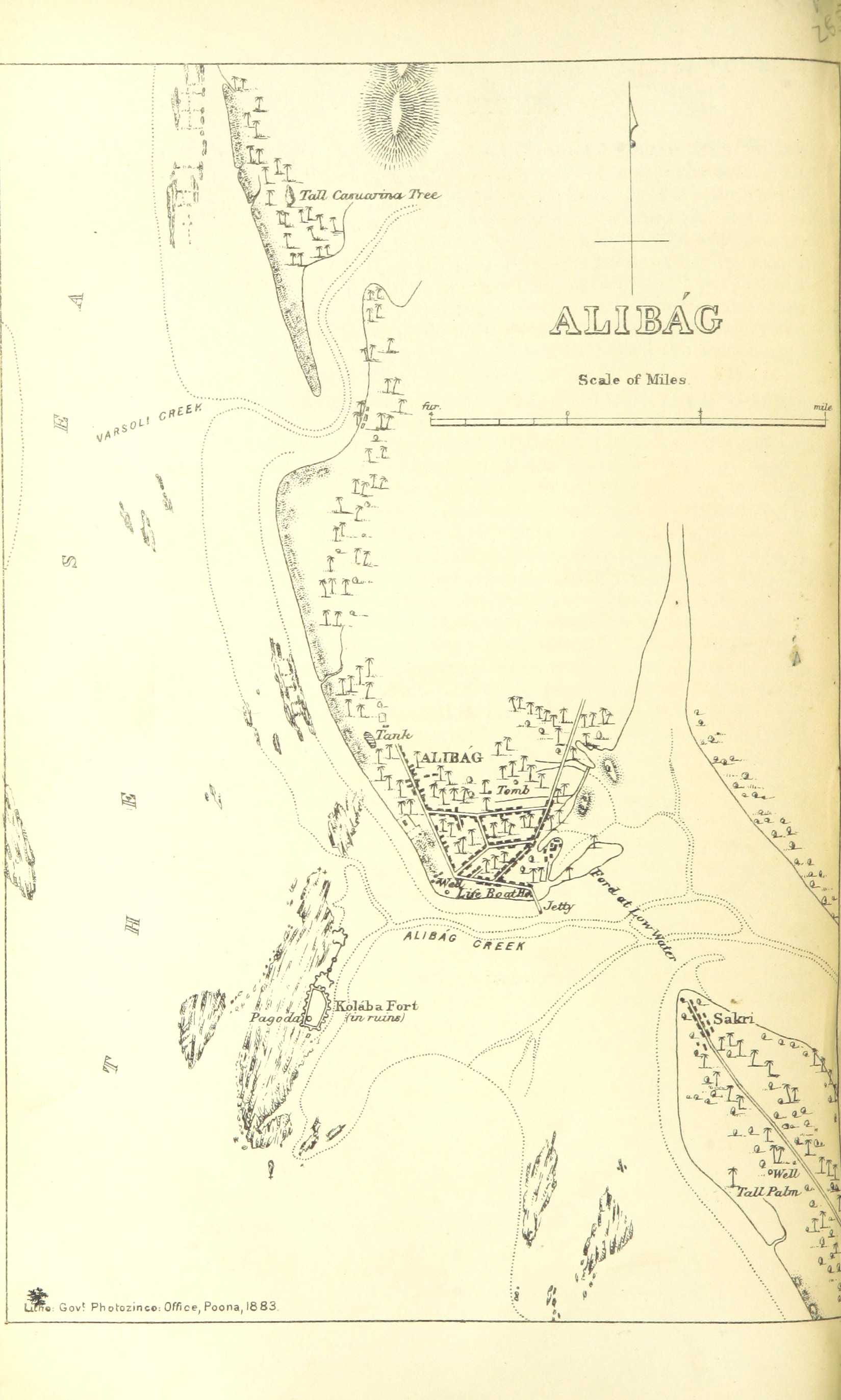 Alibag, India 1896